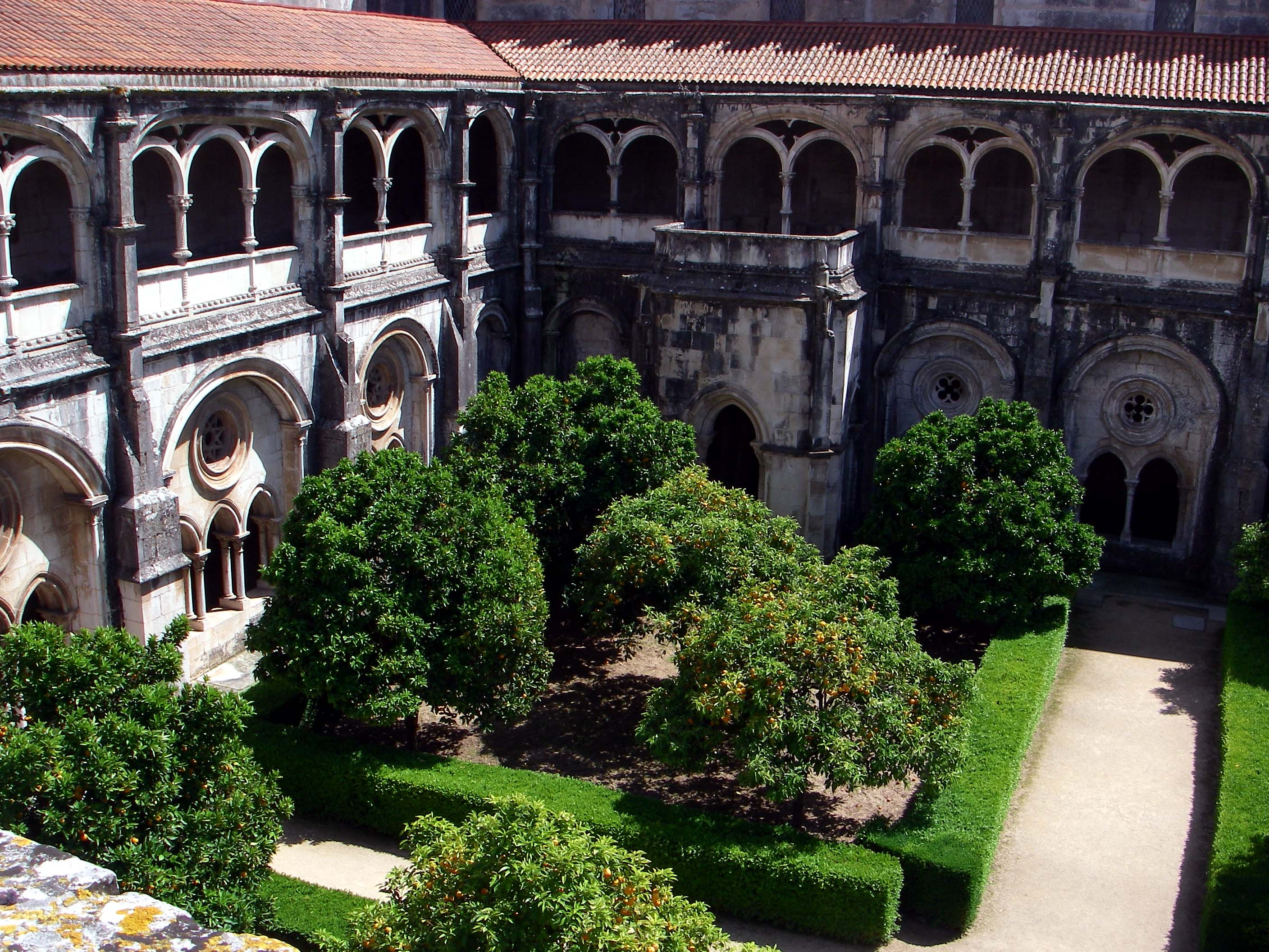 Mosteiro de Alcobaça